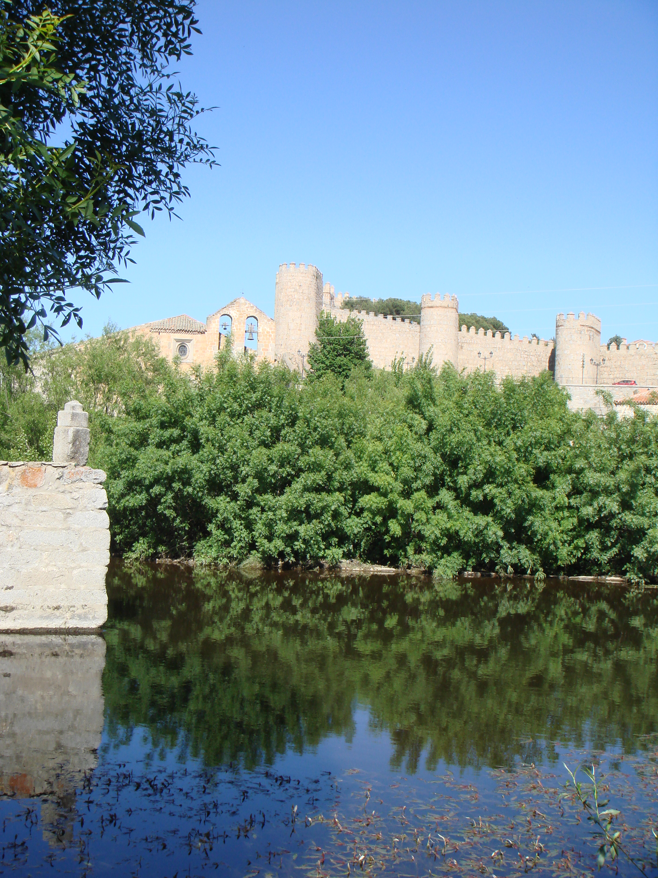 Iglesia de San Segundo vista desde el río Adaja (Ávila, España).